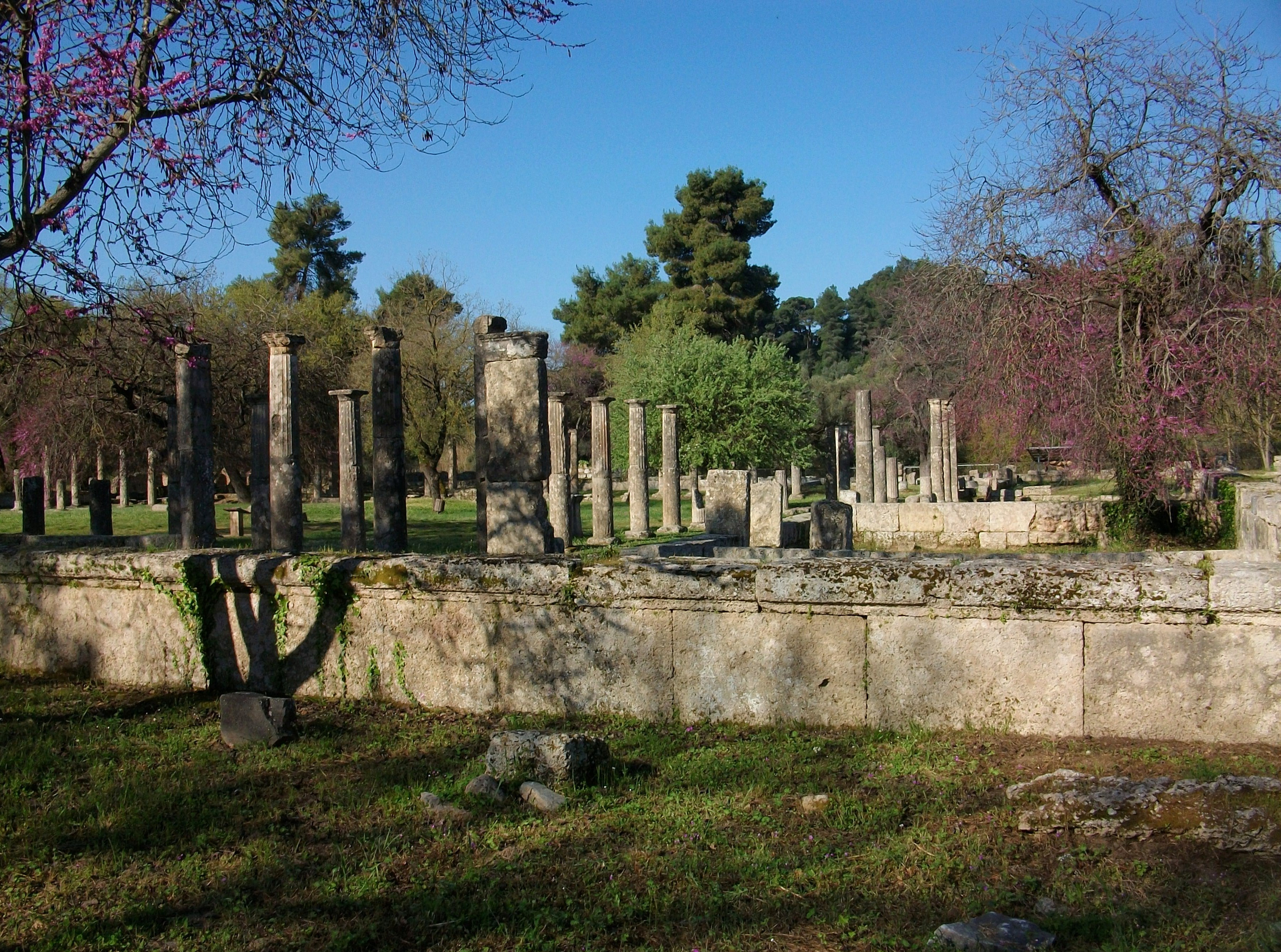 Palestra (Olímpia).